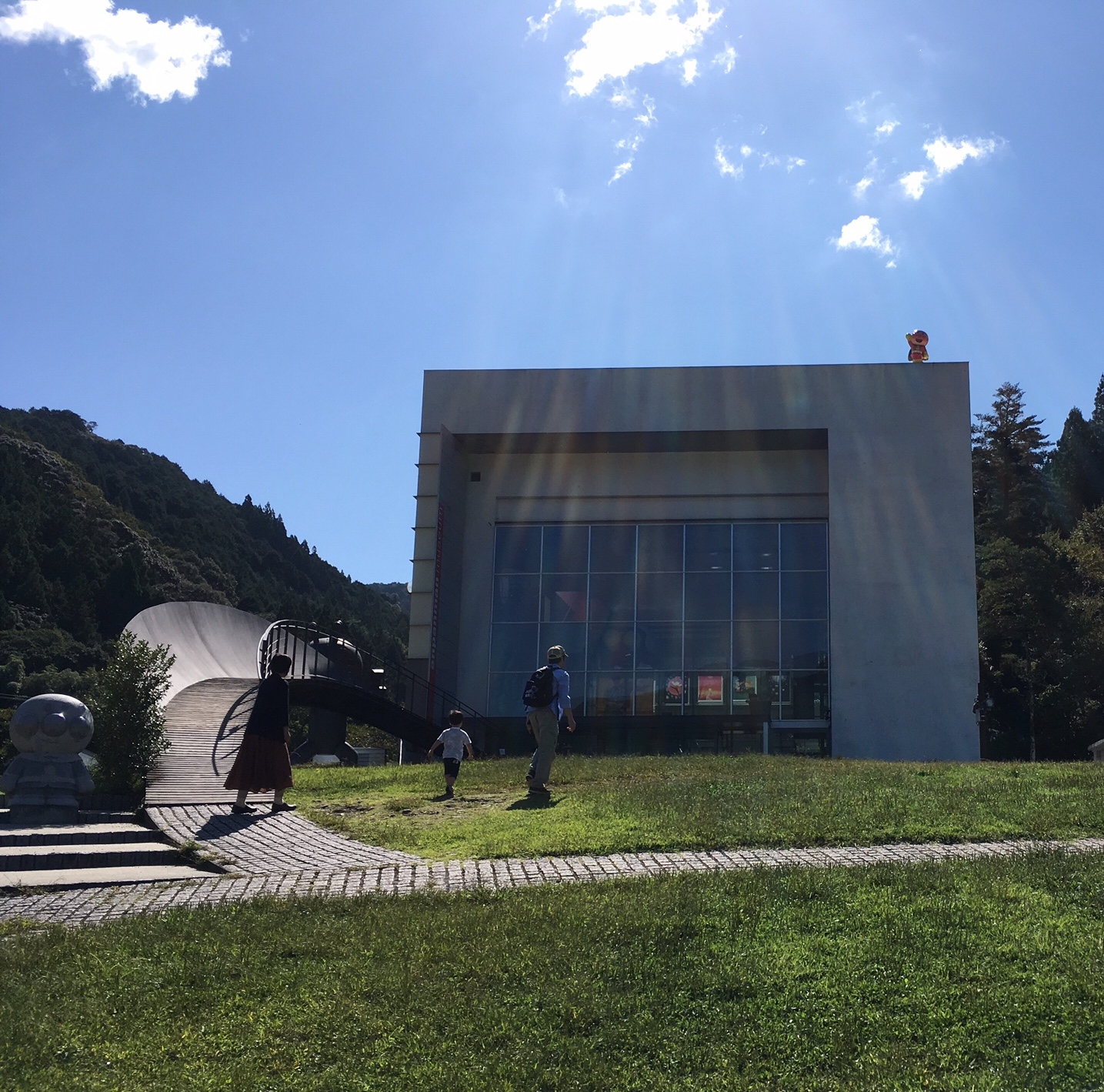 古谷誠章の作品